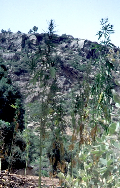 Plan de haschisch